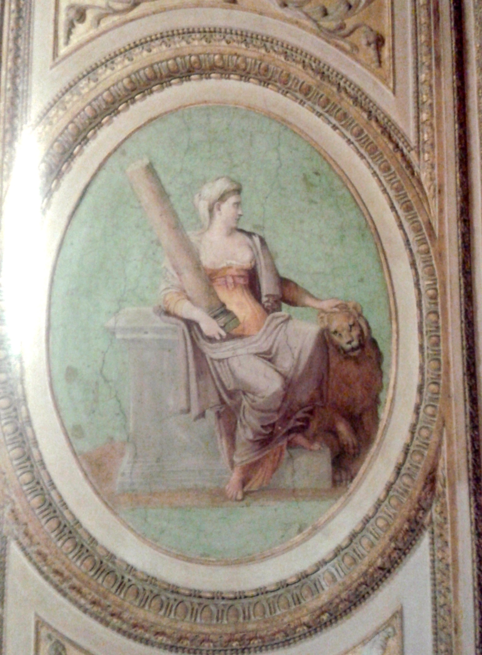 Galleria Farnese, La Forza